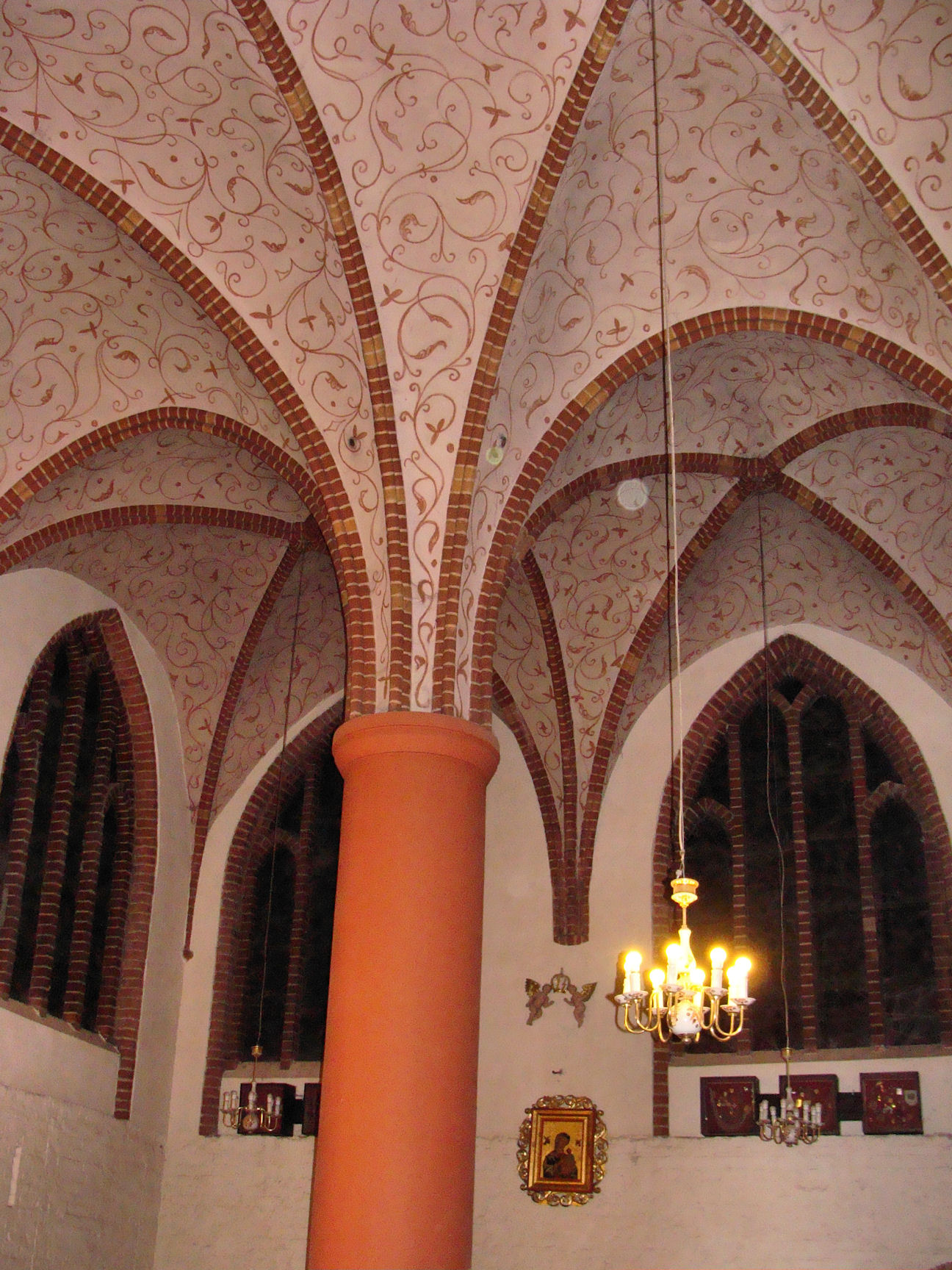 Bazylika Archikatedralna w Szczecinie